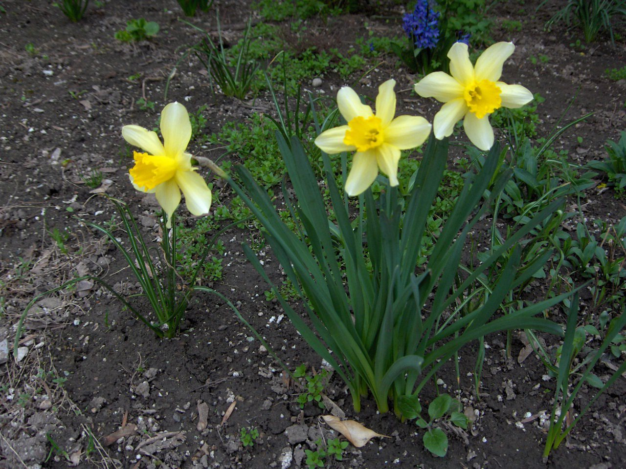 Pompás nárcisz (Narcissus incomparabilis) egy budai előkertben.